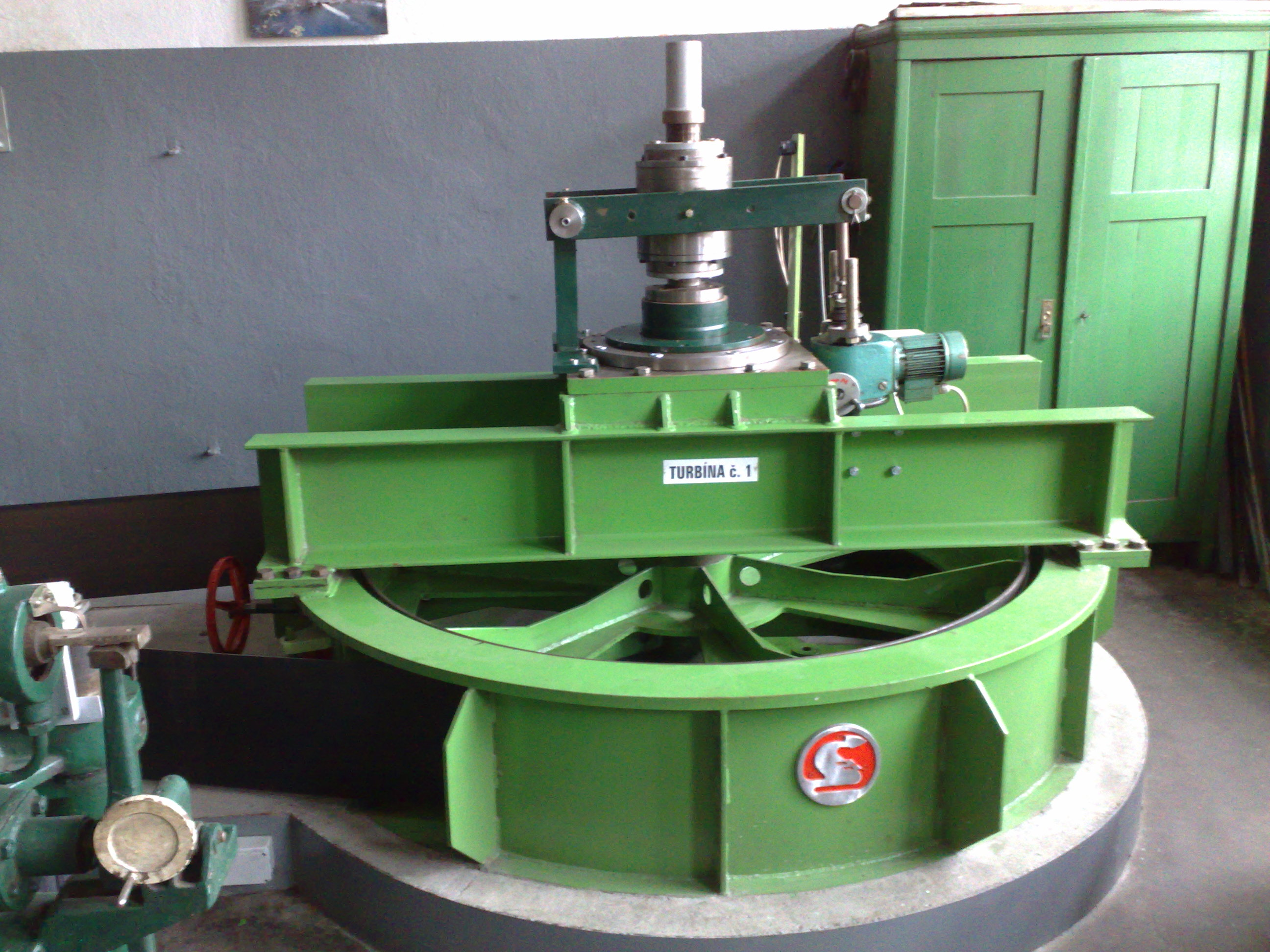 Horní kryt Kaplanovi turbíny.